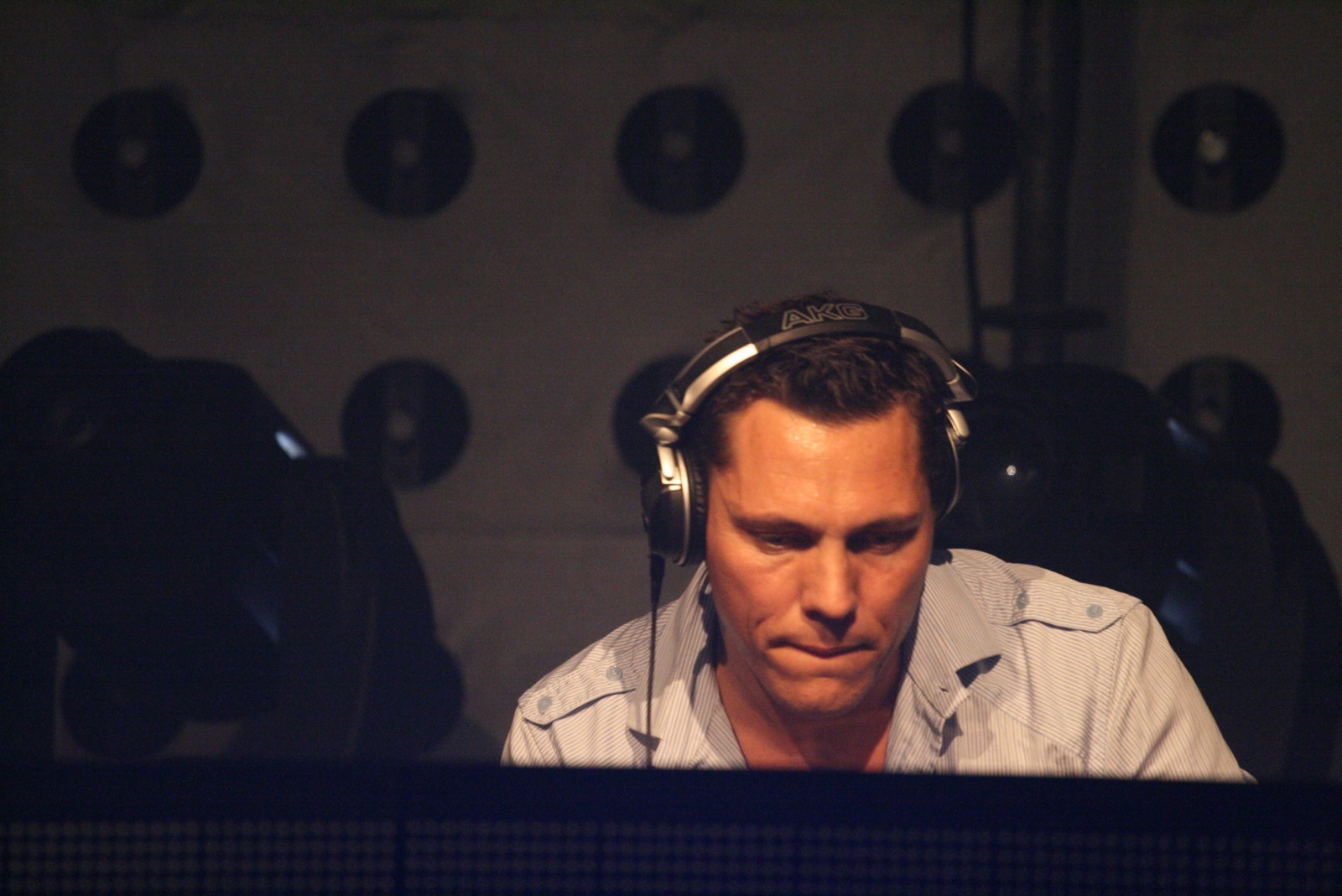 tiësto op lanceringsevent van Elements of Life